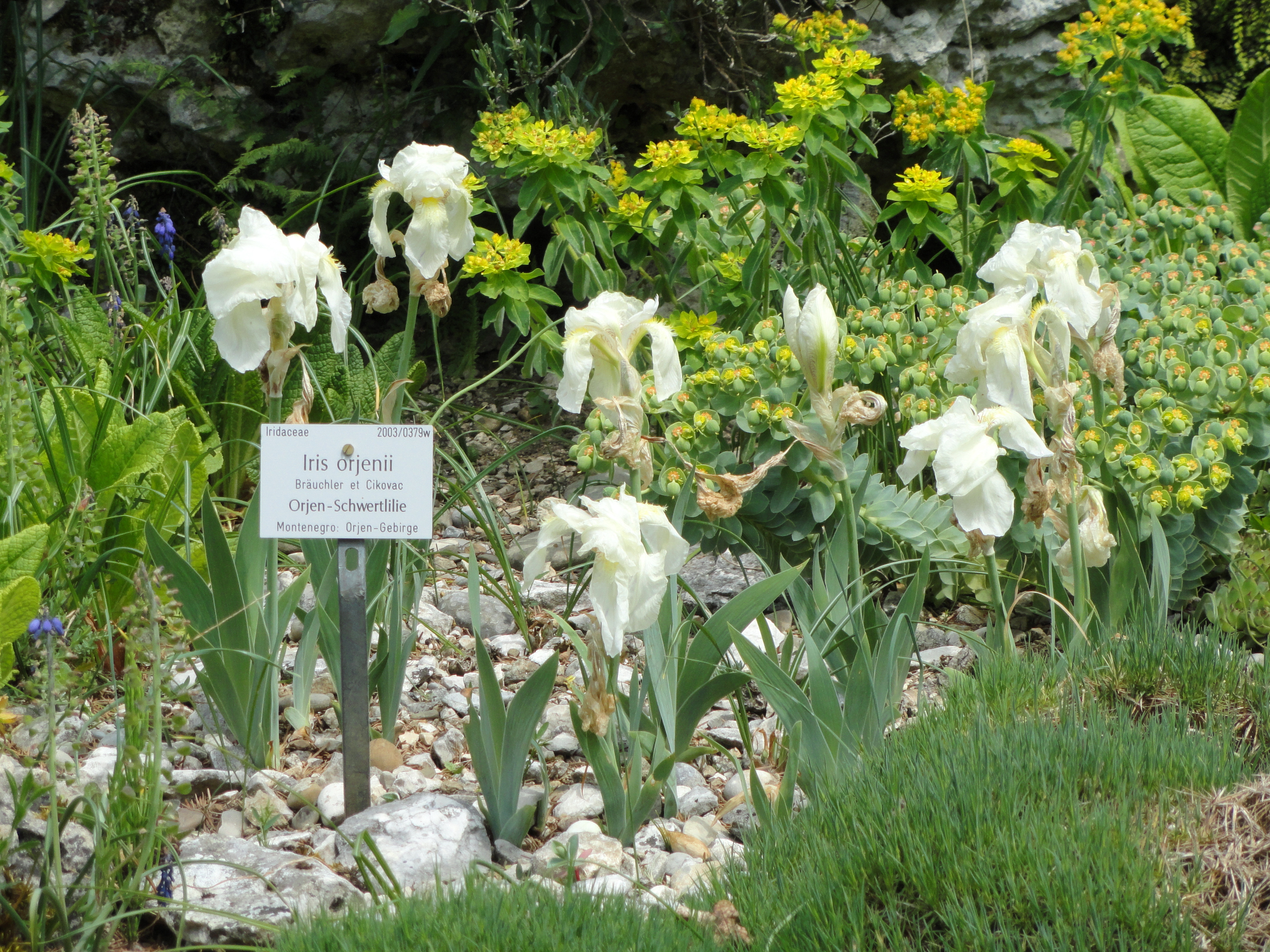 Iris orjenii specimen in the Botanischer Garten München-Nymphenburg, Munich, Germany.